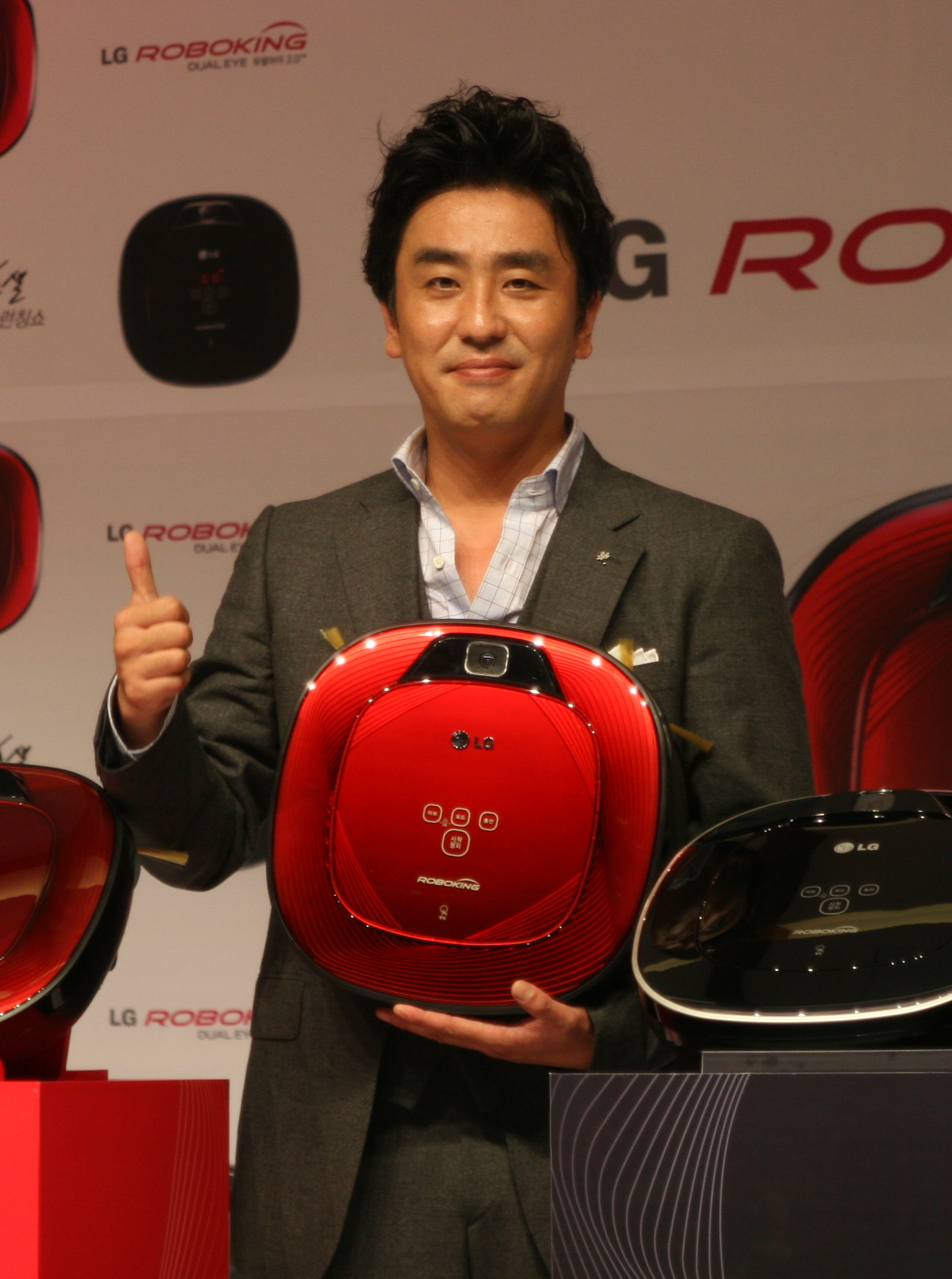 2012년 9월 13일 'Mr.로보킹 다이어리' 런칭행사에서 로보킹 홍보 중인 류승룡